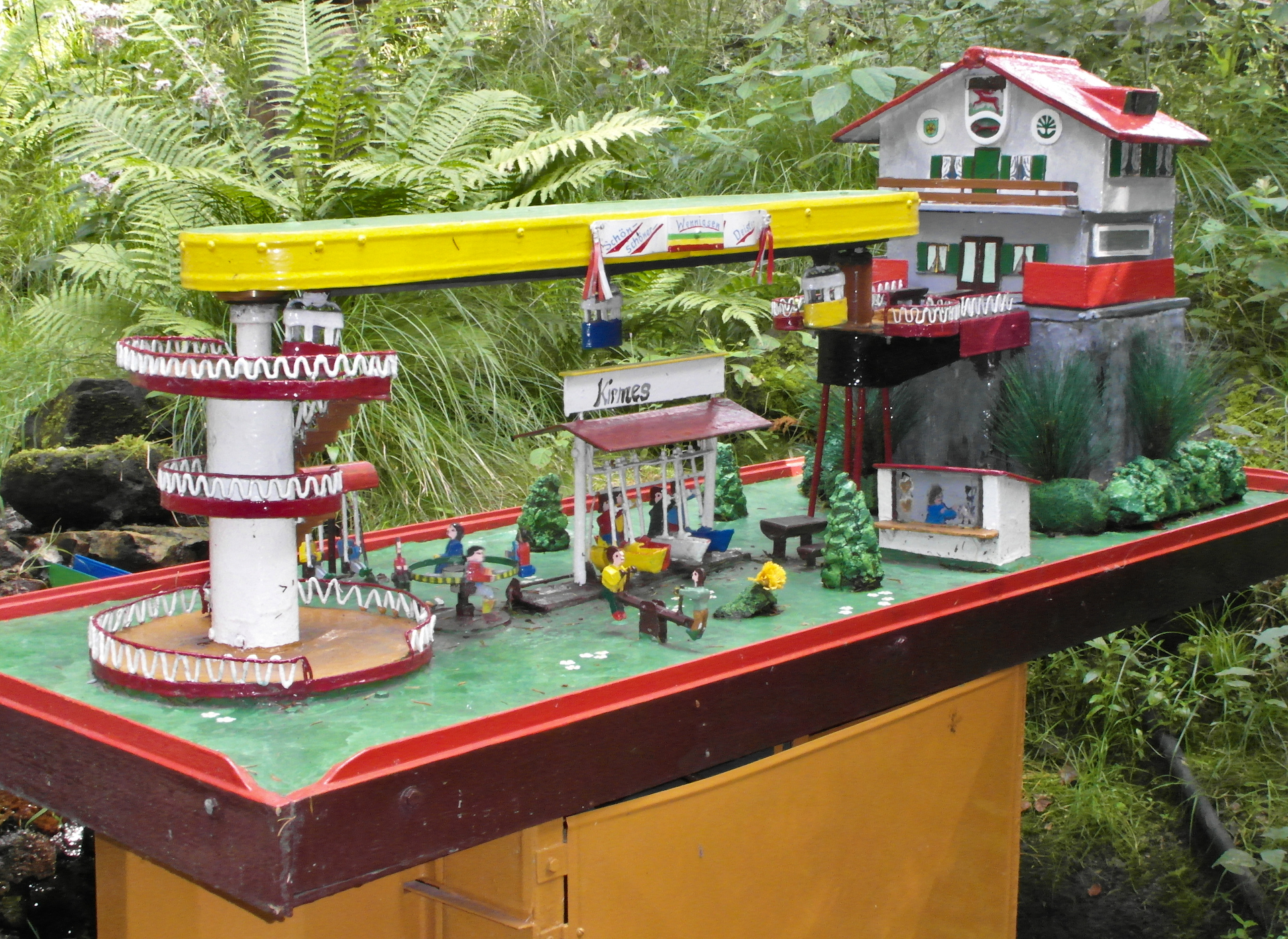 Die Modelle der Wennigser Wasserräder werden jährlich in oft überarbeitetem Design aufgebaut.